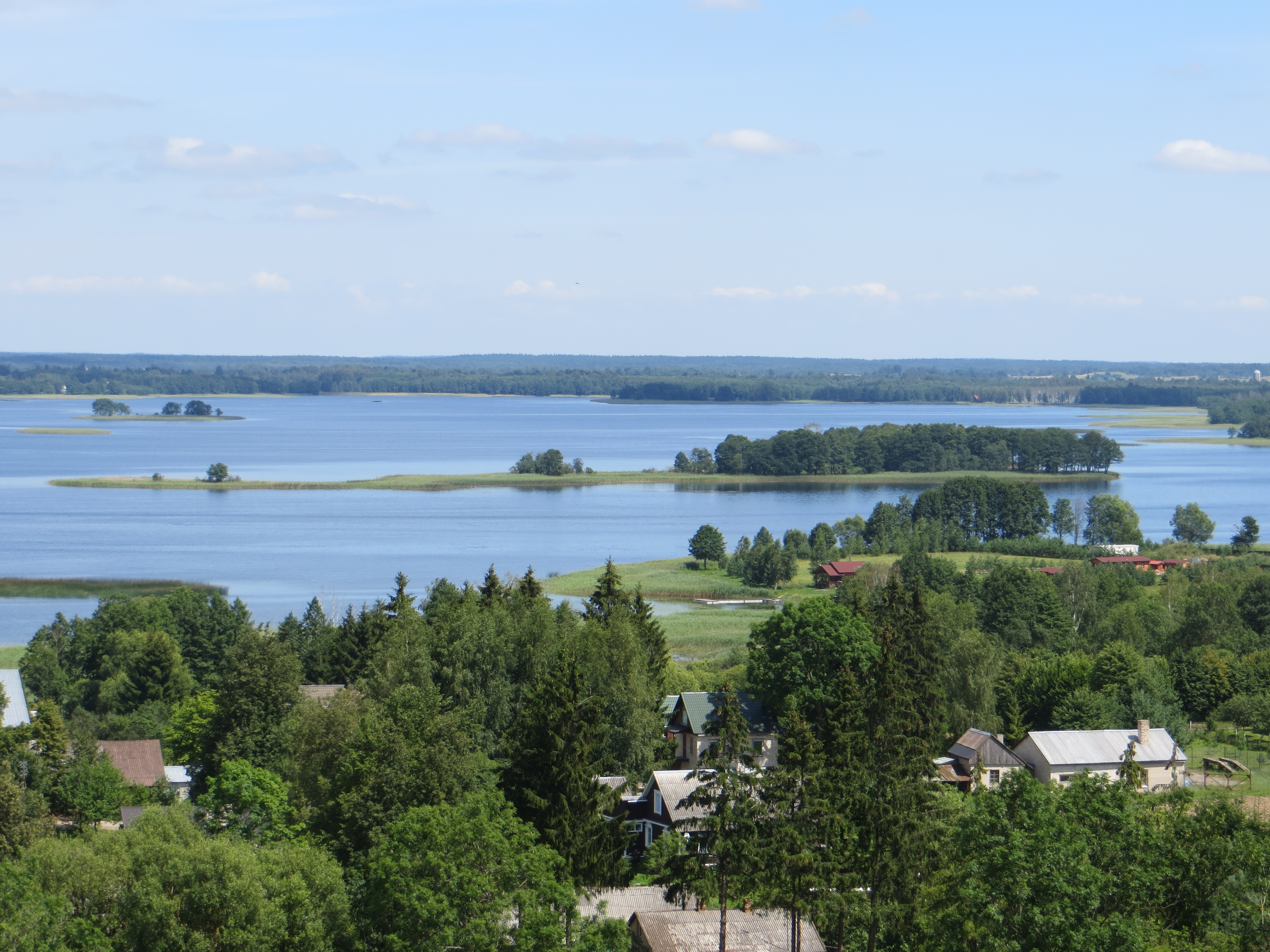 Miežonys, Lithuania